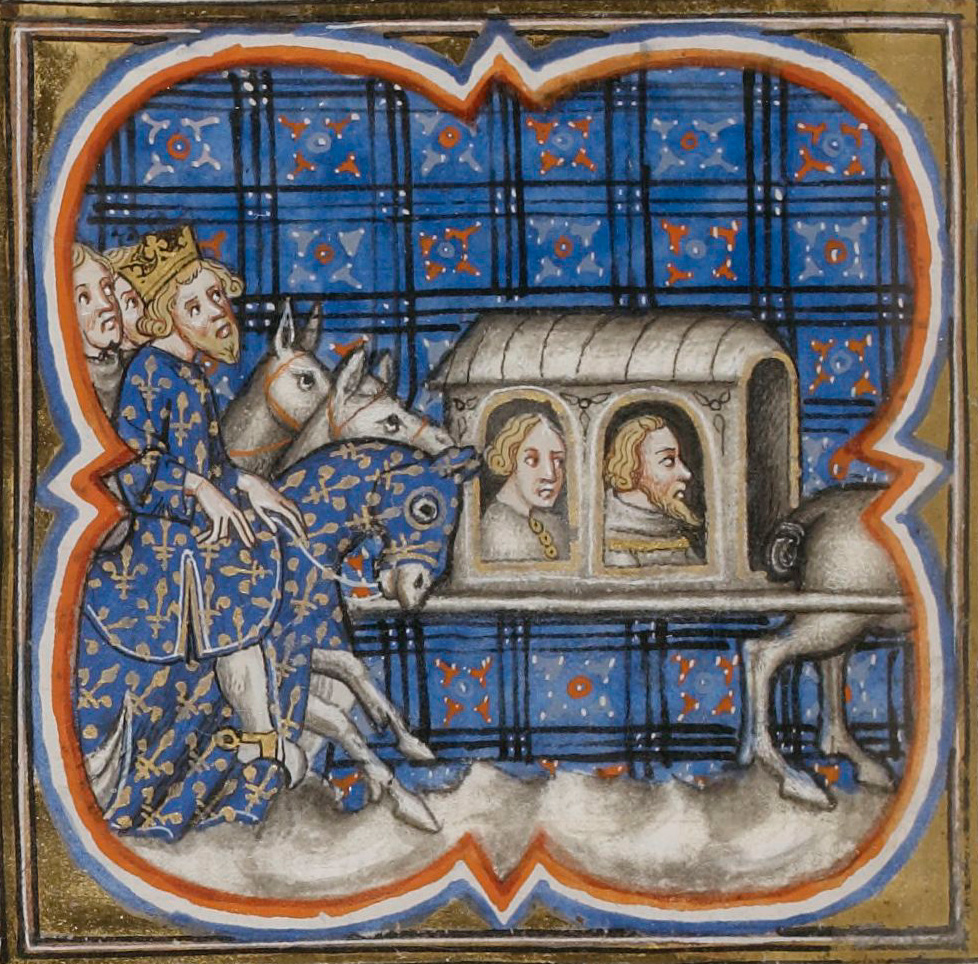 Philippe Auguste ramenant Ferrand de Portugal, comte de Flandre, et Renaud, comte de Boulogne, faits prisonnier à la bataille de Bouvines. Enluminure des Grandes Chroniques de France, XIVe siècle, Paris, Bibliothèque nationale de France, Département des manuscrits, Français 2813, folio 258 verso.